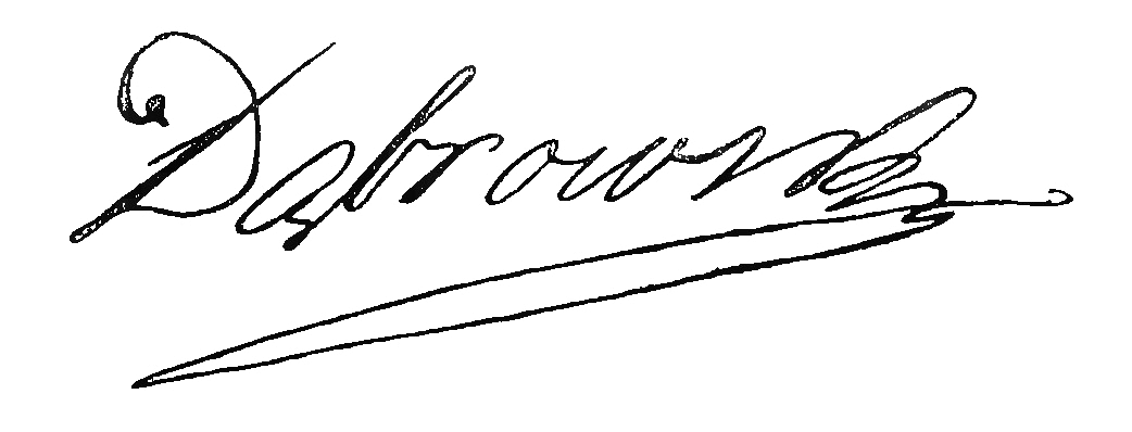 grafika z książki PL - Album biograficzne zasłużonych Polaków wieku XIX t.1 publikacja Marii Chełmońskiej Warszawa 1901